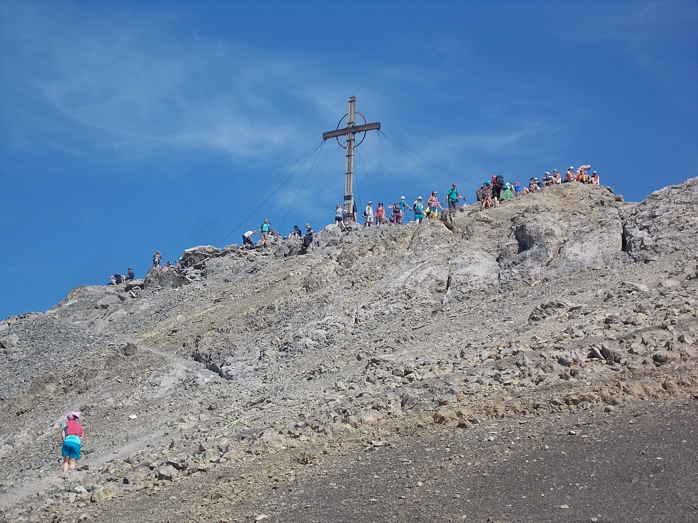 Massenandrang im Sommer auf dem Schesaplanagipfel